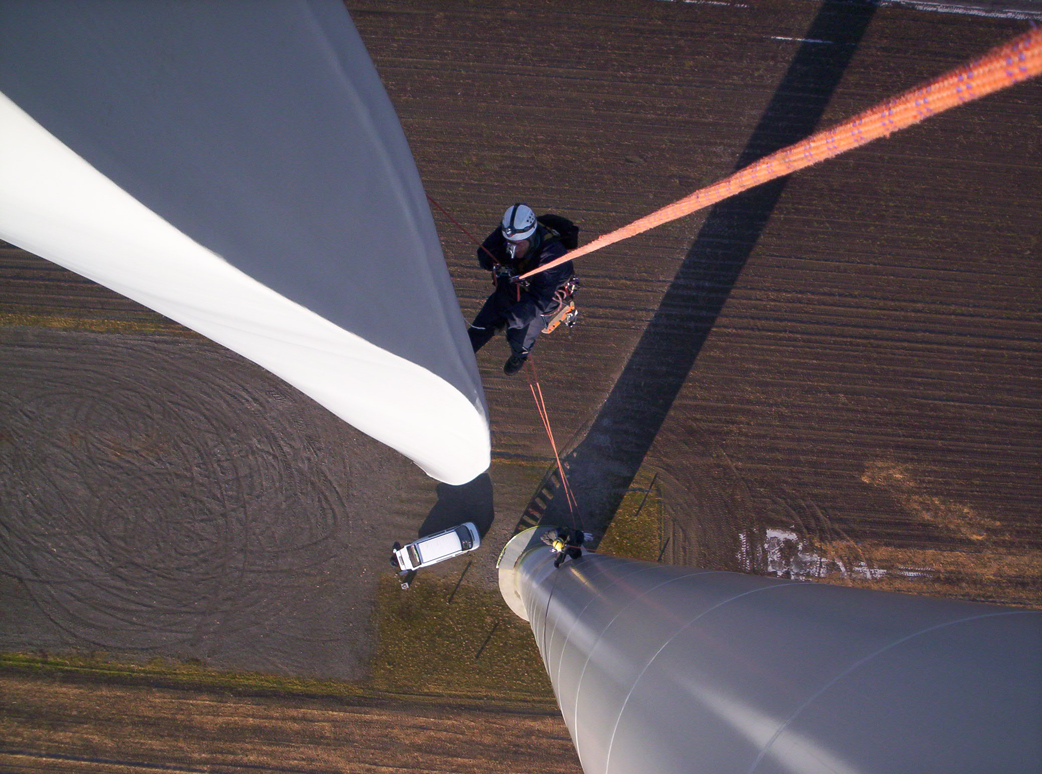 Begutachtung eines Rotorblattes und des Turmes einer Windenergieanlage